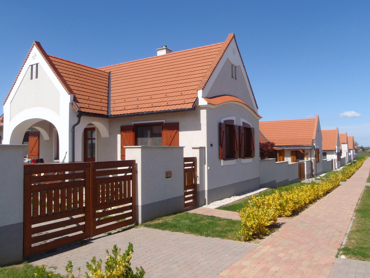 Magyarlakótelep